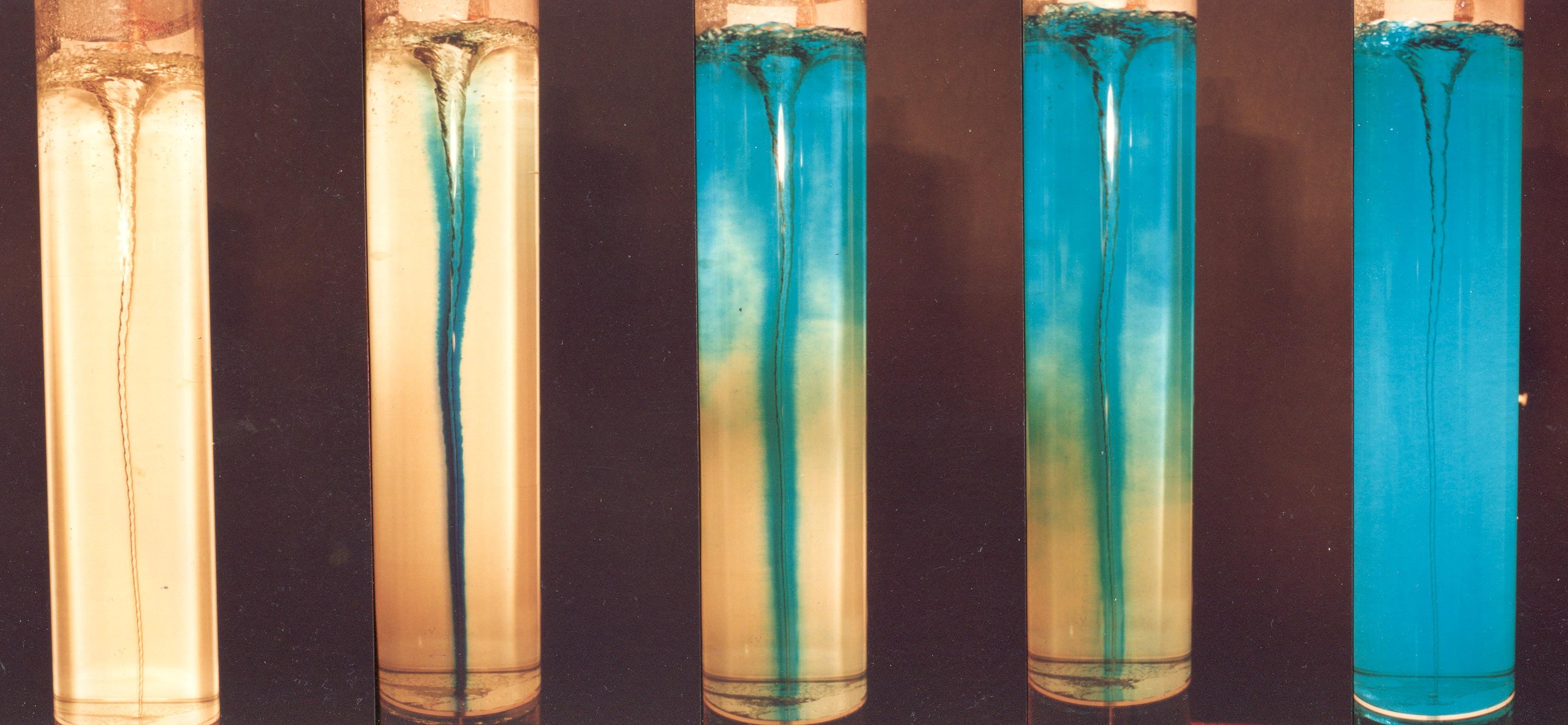 Entwicklung von Vermischungsvorgängen, sichtbar gemacht mit Farbe in Wasser